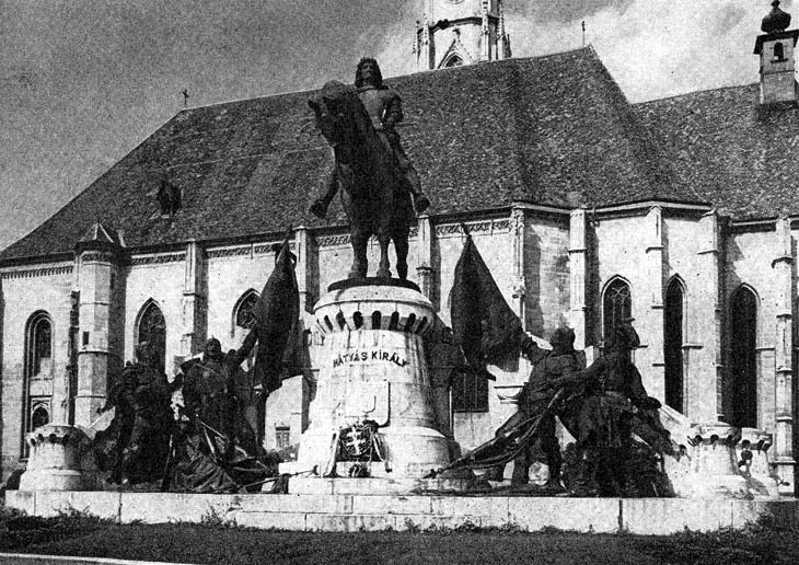 Fadrusz János: Mátyás király emlékmûve. (Kolozsvár.)